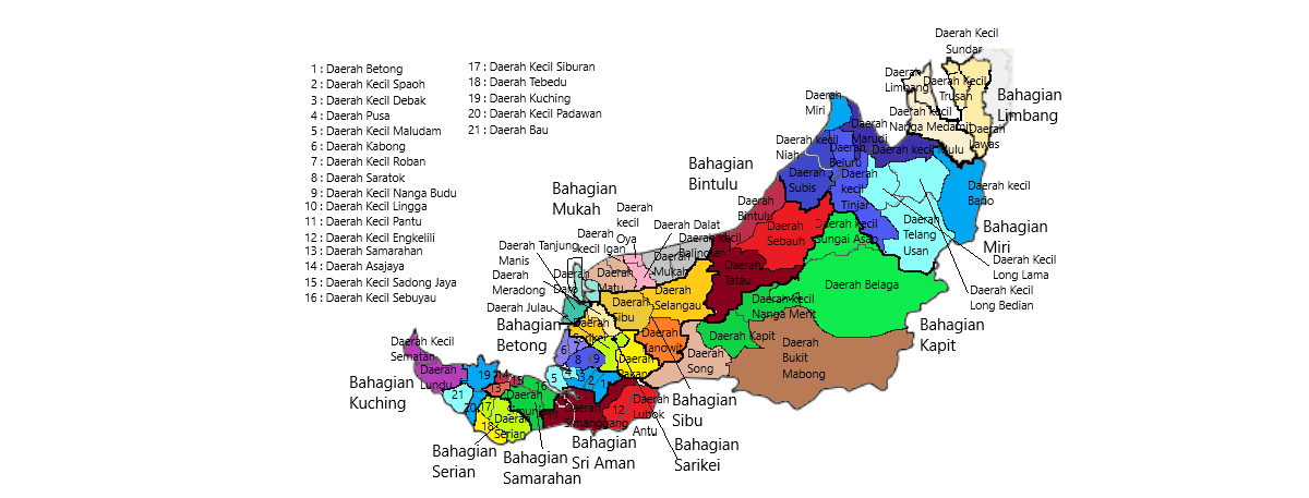 Peta Sarawak mengikut pembahagian daerah setiap bahagian